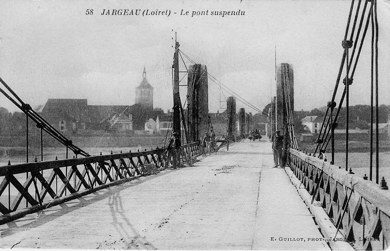 Jargeau, le pont suspendu. Première époque. Loiret, France